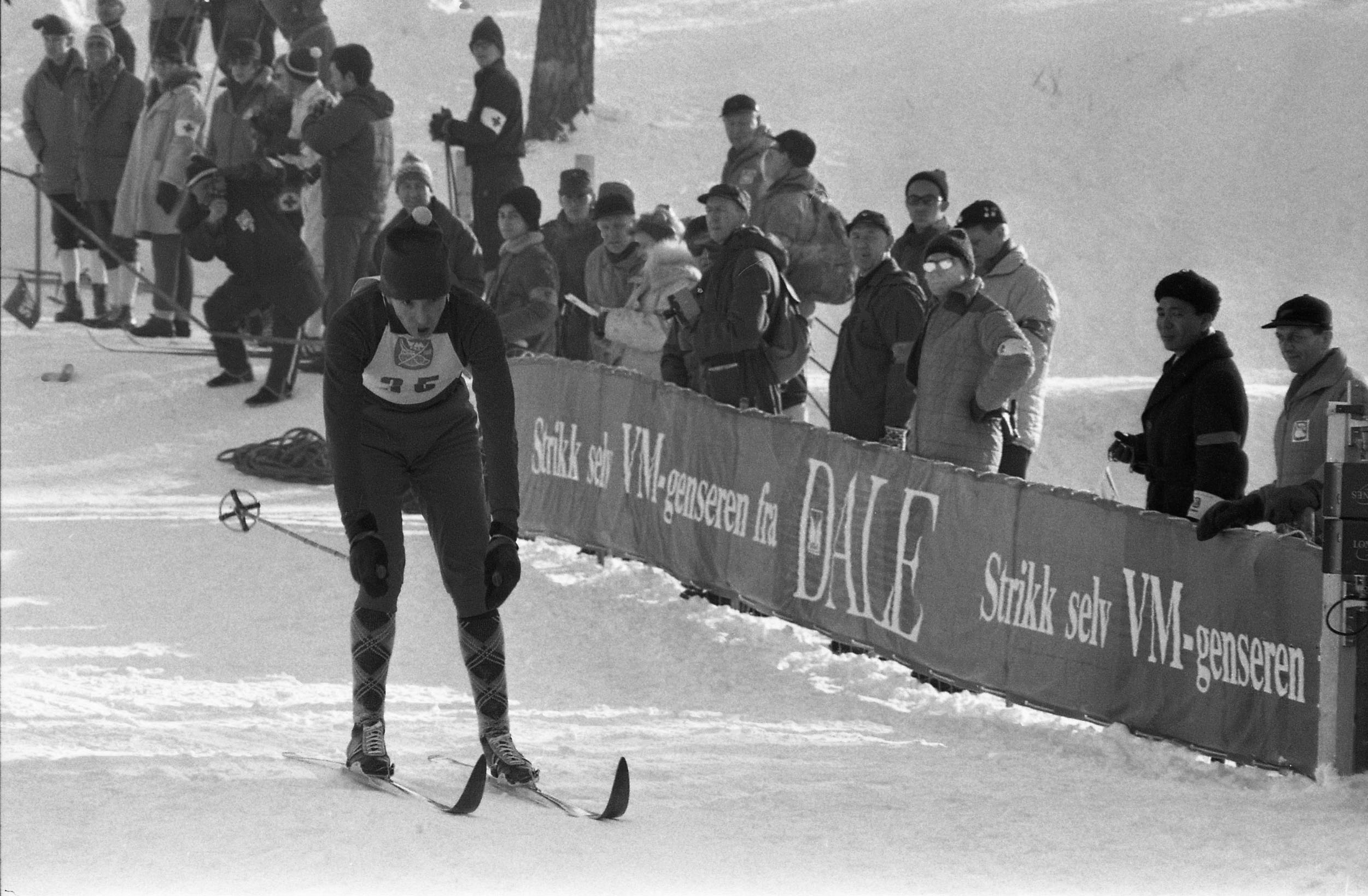 Beskrivelse: 10 km langrenn for damer under verdensmesterskapet på ski i Oslo 1966, gullvinner Bajarskikh fra Sovjet. Fotograf: Billedbladet NÅ/van Deurs Sted: Oslo År: 1966 Arkivreferanse: RIKSARKIVET- RA/PA/0797/U/Ua/3896_1_038 K. BAJARSKIKH DURING CROSS COUNTRY SKIING FOR WOMEN, NORDIC WORLD SKI CHAMPIONSHIPS IN OSLO 1966 Description: 10 km cross country for women during the Nordic World Ski Championships in Oslo 1966, gold winner Bajarskikh from the Soviet Union. Photographer: Billedbladet NÅ/van Deurs Place: Oslo Year: 1966 Archival reference: RA/PA/0797/U/Ua/3896_1_038